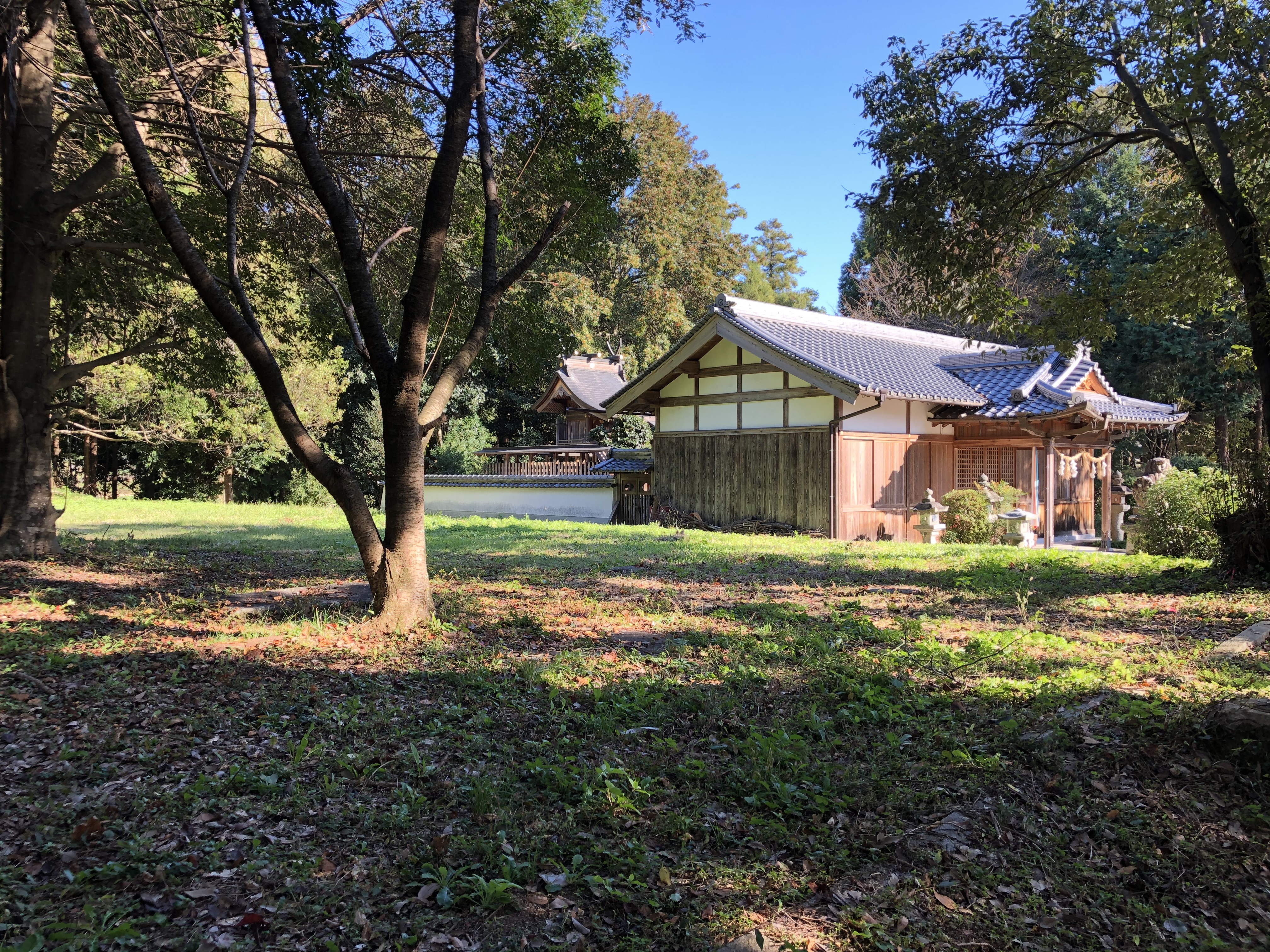 史跡 檜隈寺跡 (講堂跡地と於美阿志神社の拝殿・本殿)